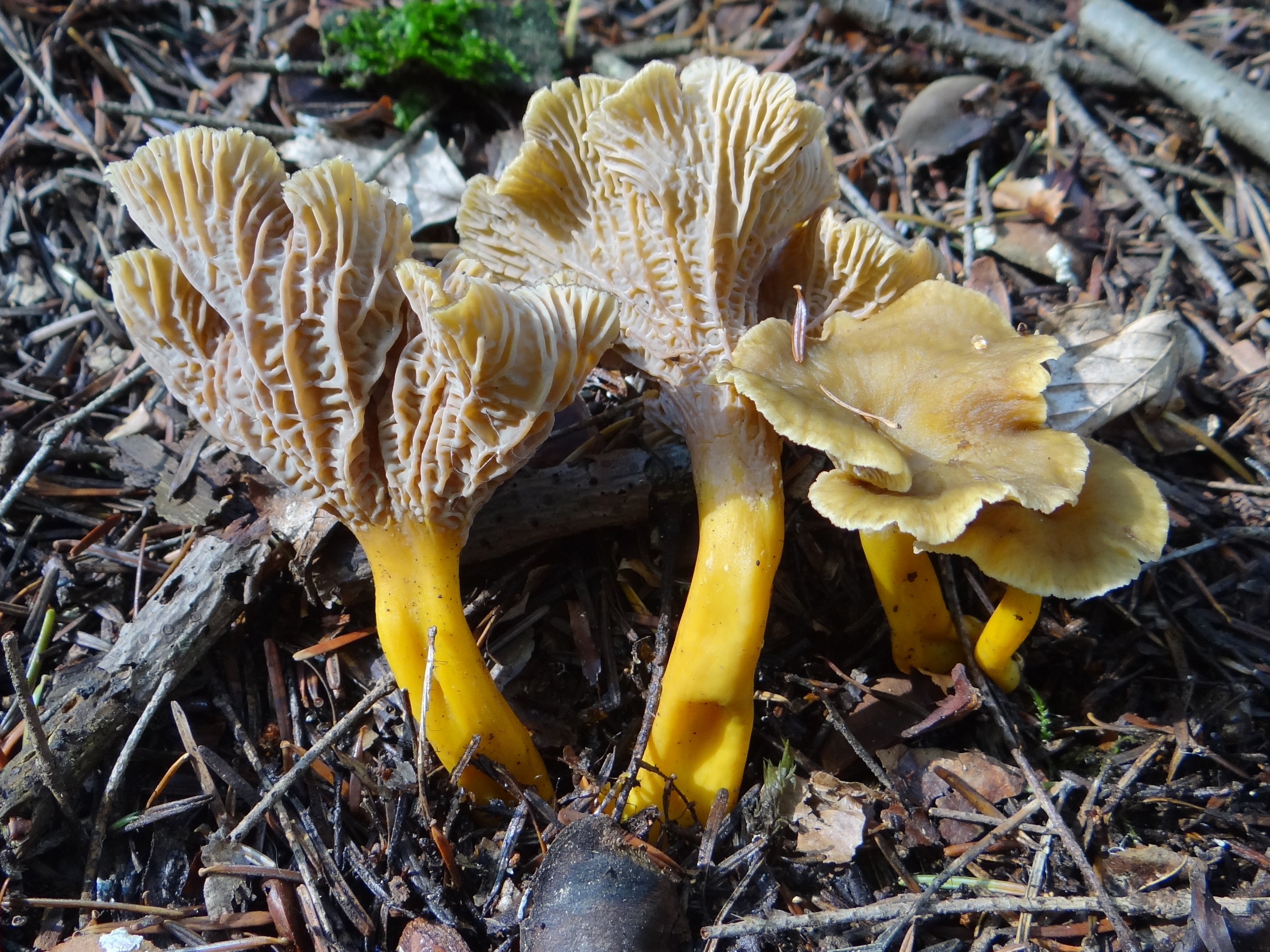 Craterellus lutescens Question